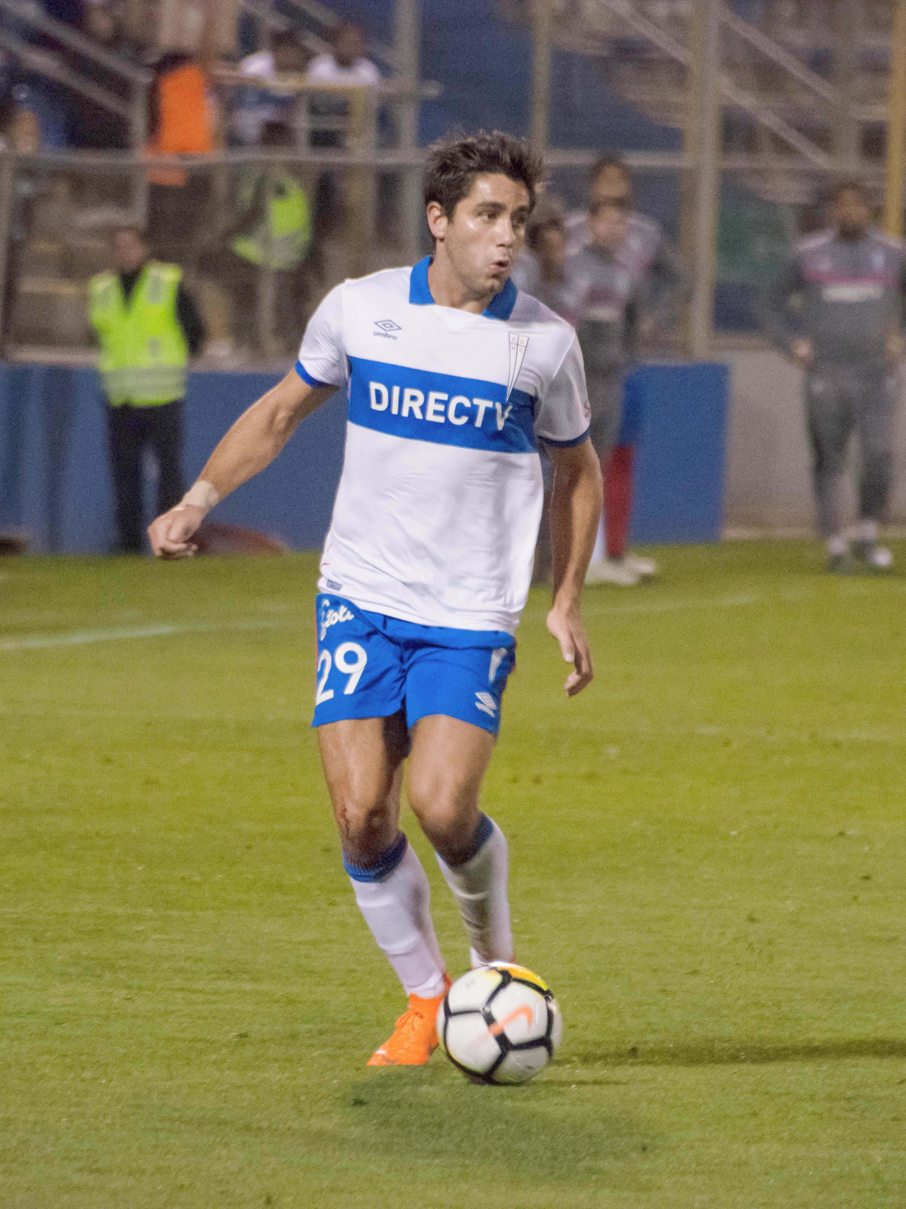 Universidad Católica v Huachipato, Estadio San Carlos de Apoquindo, Las Condes, Santiago, Chile.